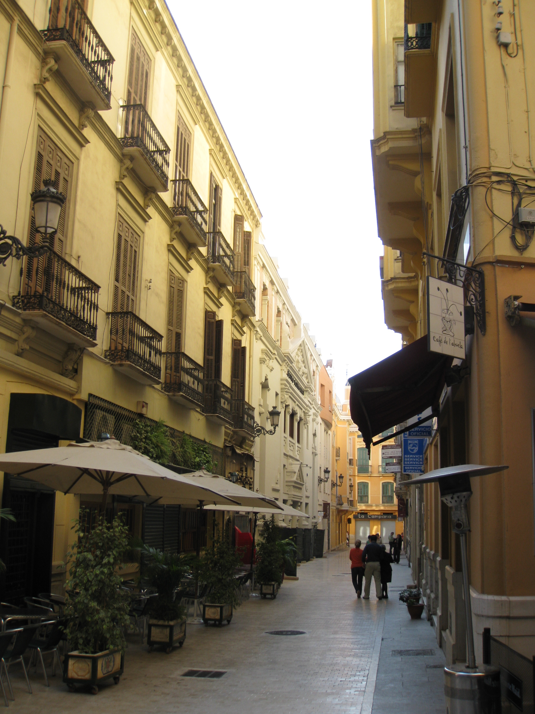 Calle Echegaray, Málaga, España